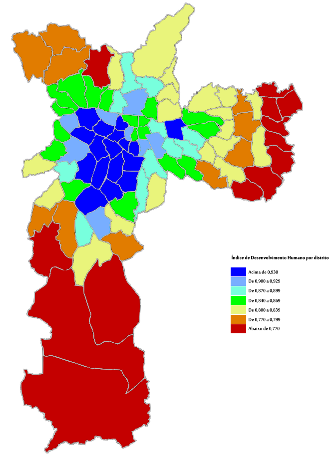 Índice de Desenvolvimento Humano dos distritos da cidade de São Paulo